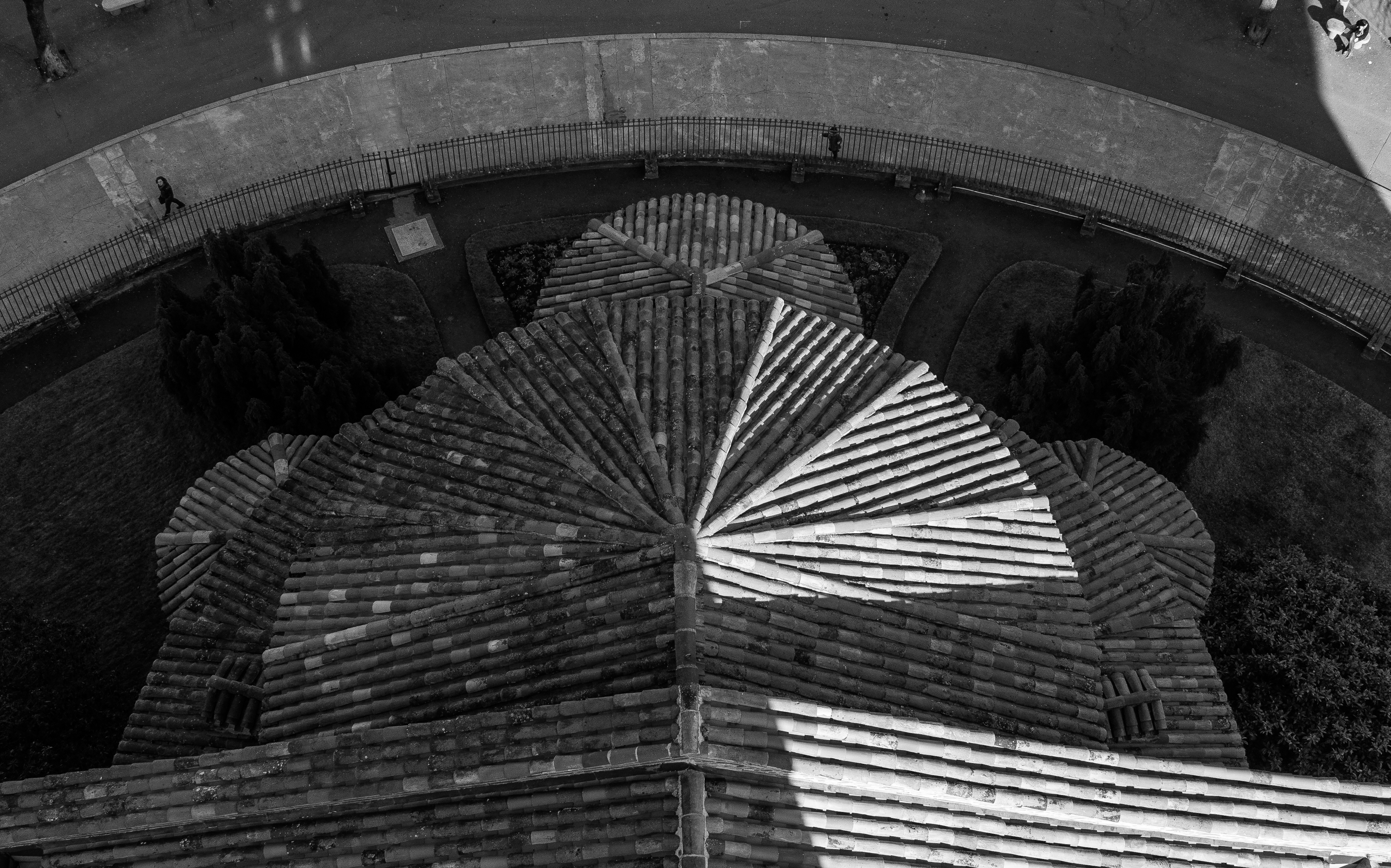 La toiture du choeur de la basilique Saint-Sernin vue du clocher.